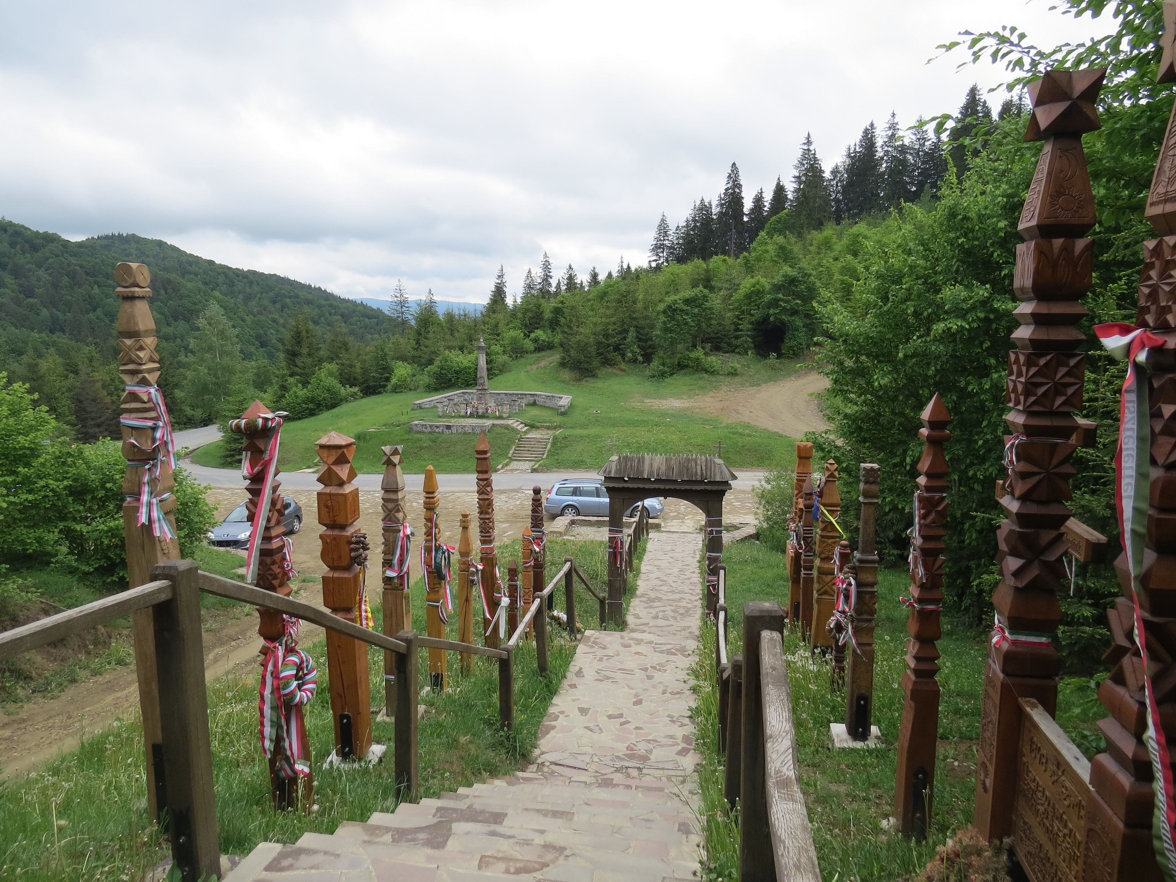 Nyerges-tető, az 1848–49-es forradalom és szabadságharc egyik utolsó székelyföldi csatájának színhelye. Az erdő szélén lévő területen, egy tömegsírba hantolták el akkor az ütközet áldozatait, akiknek emlékét többek közt számtalan kopjafa őrzi.